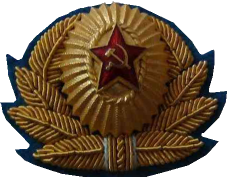 кокарда генералов